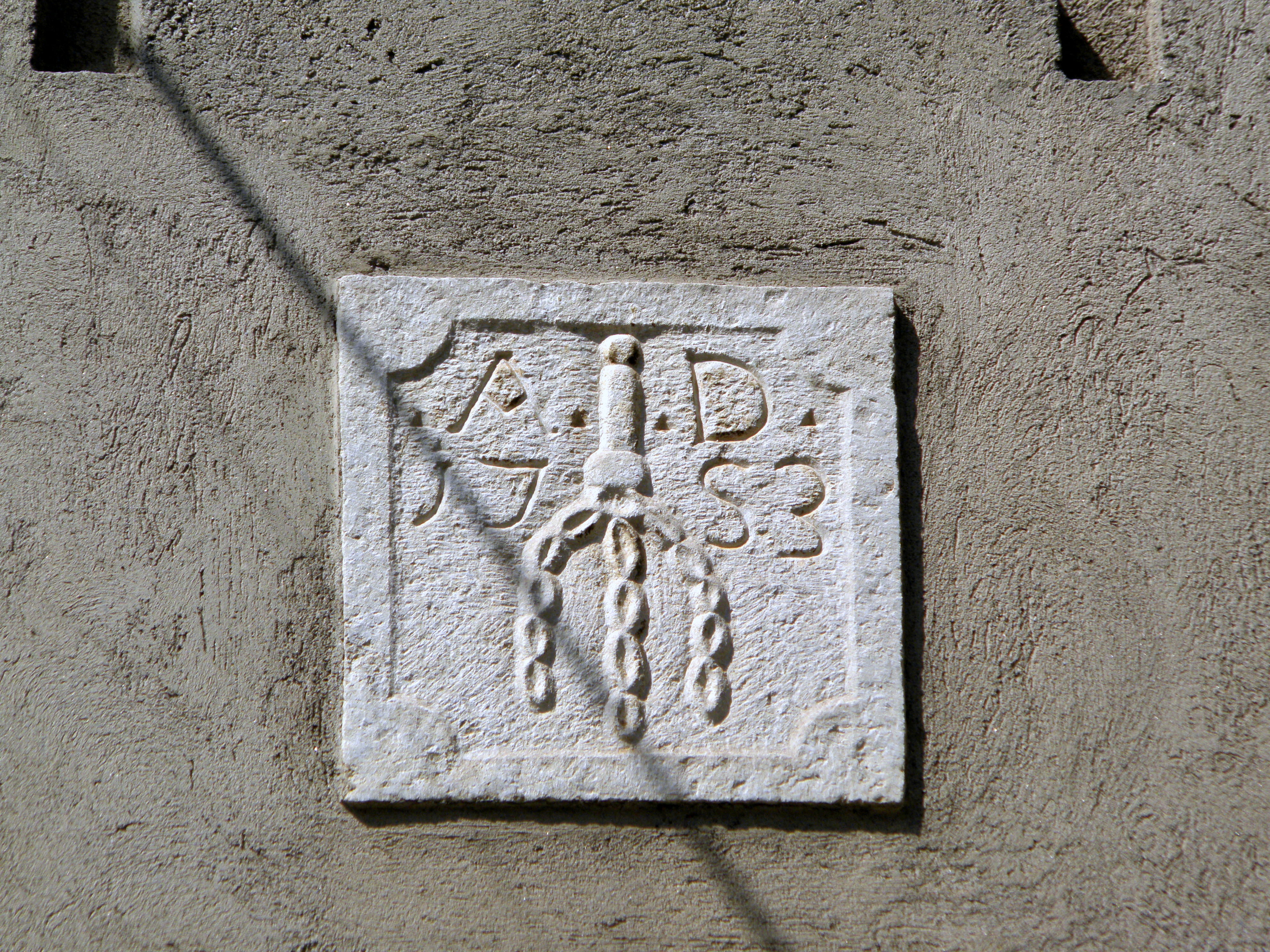 Travagliato, Via Andrea Mai: lapide con simbolo dei flagellanti, dettaglio del campanile della Chiesa della Madonna (o della Vergine) di Lourdes.